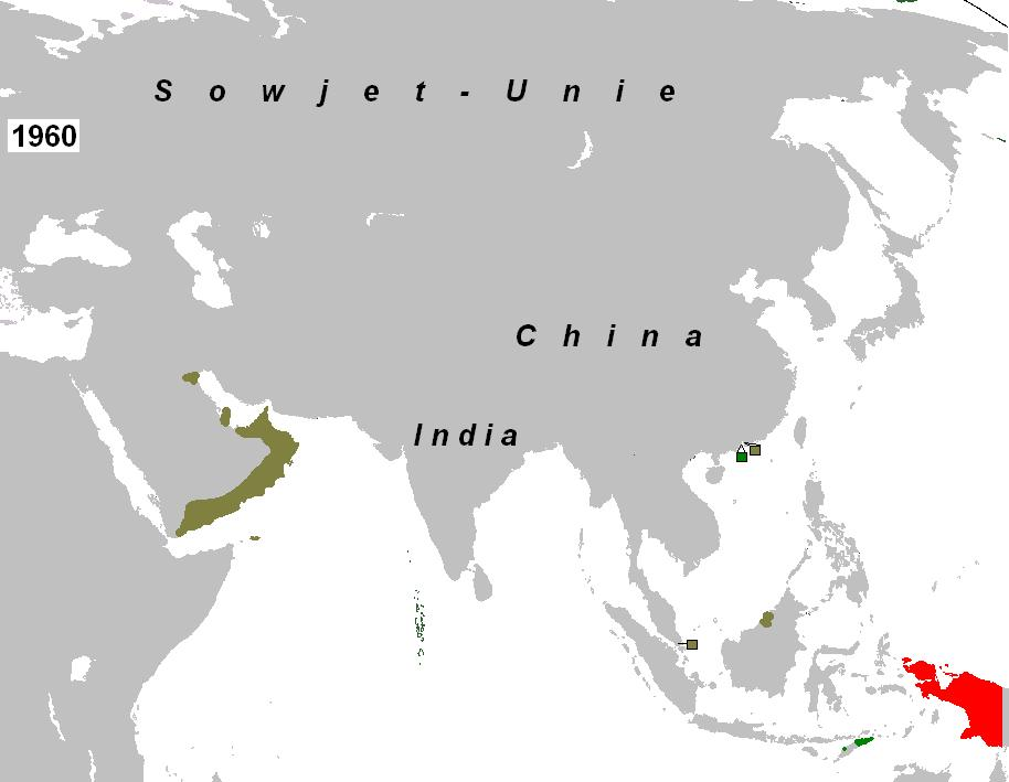 Kolonisasies van Azie uit 1960